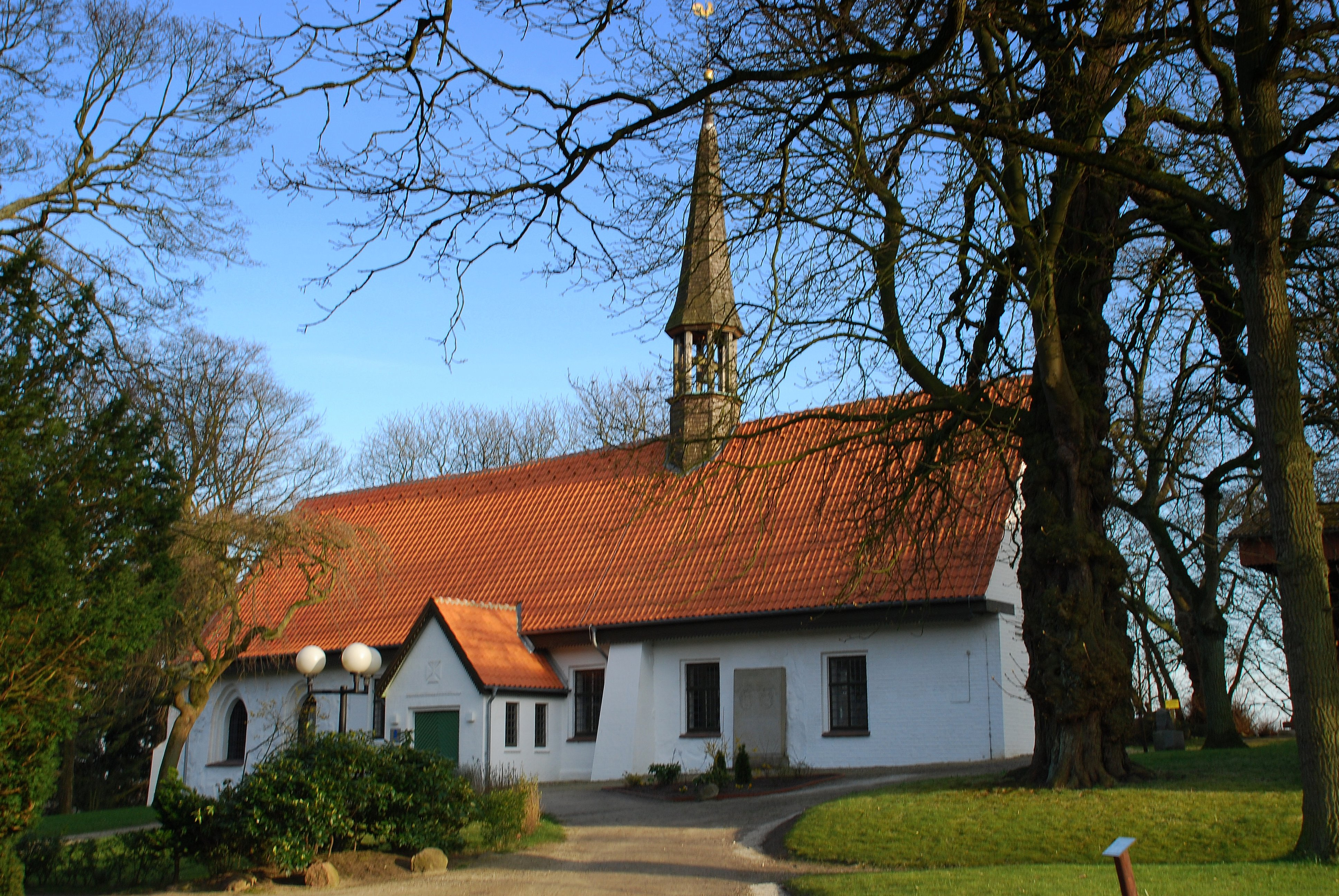 Petrikirche in Burg (Dithm.) This is a photograph of an architectural monument.It is on the list of cultural monuments of Burg (Dithmarschen)